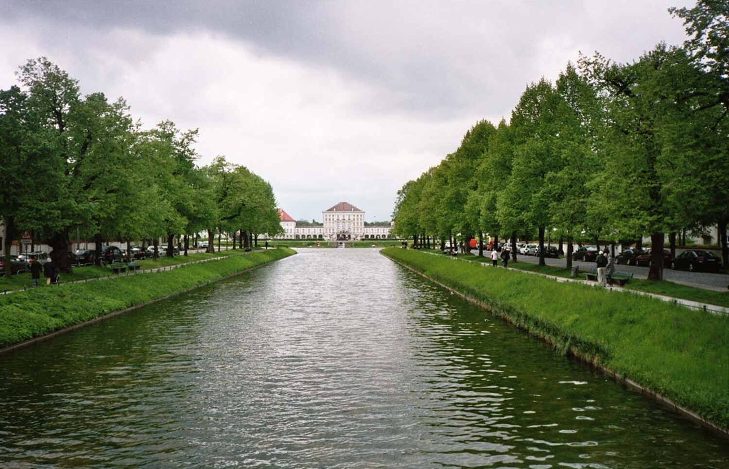 Schloss Nymphenburg, München. Nymphenburg Palace, Munich, Bavaria.